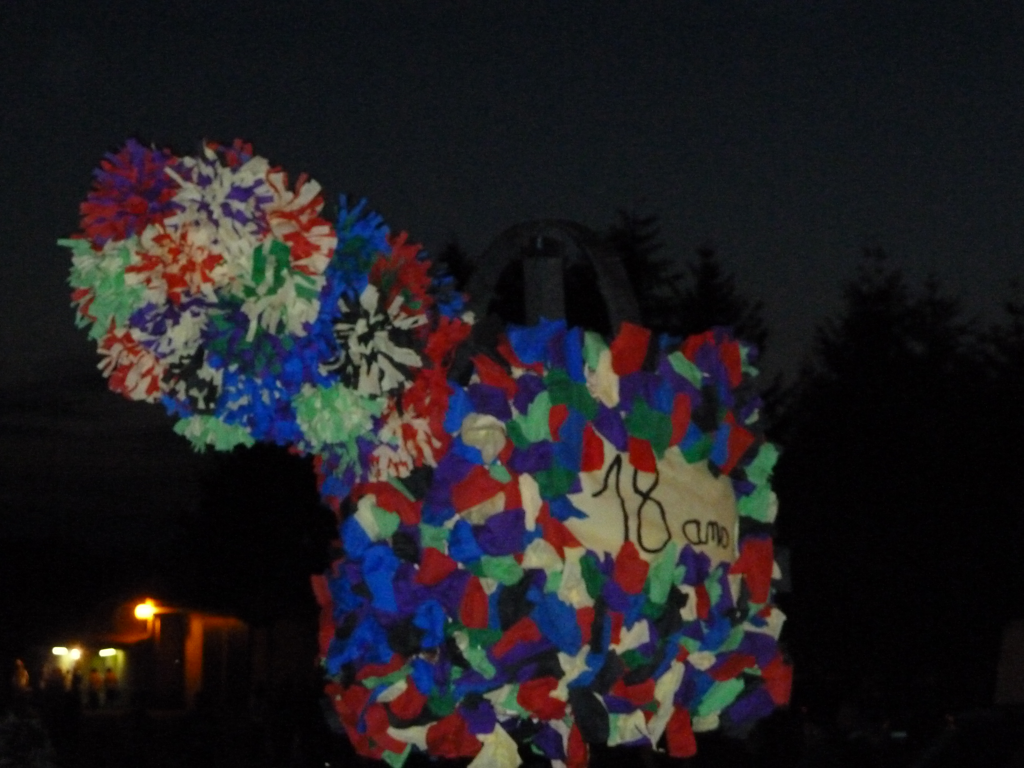 L'arrosoir des 18 ans de Violay en 2011